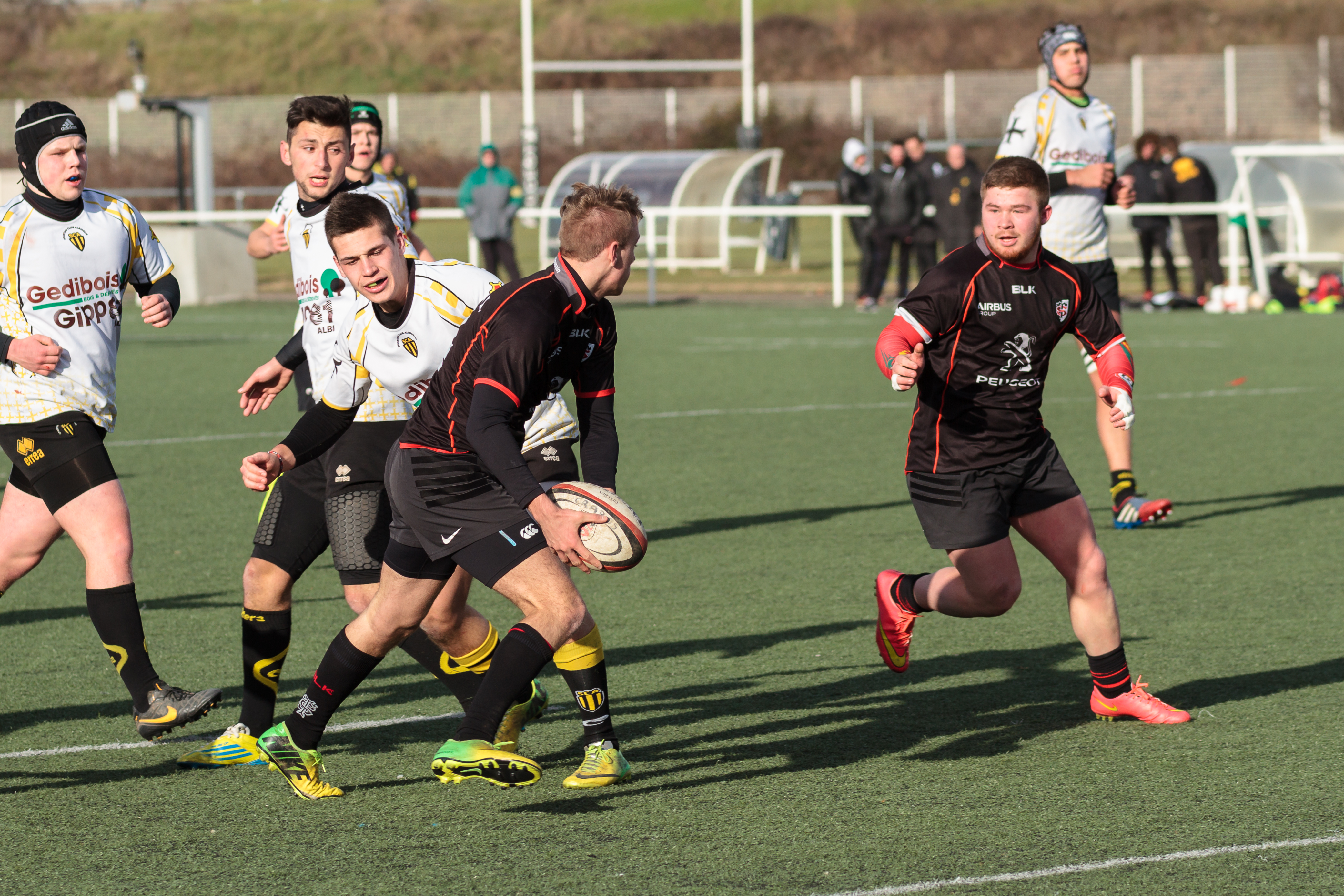 Match Crabos A - Stade toulousain vs Sporting Club Albigeois